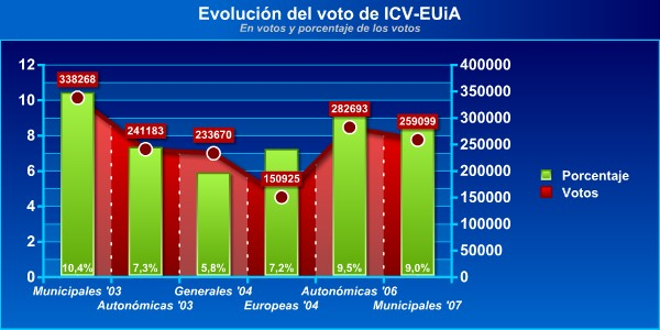 Evolución de los resultados de la coalición ICV-EUiA